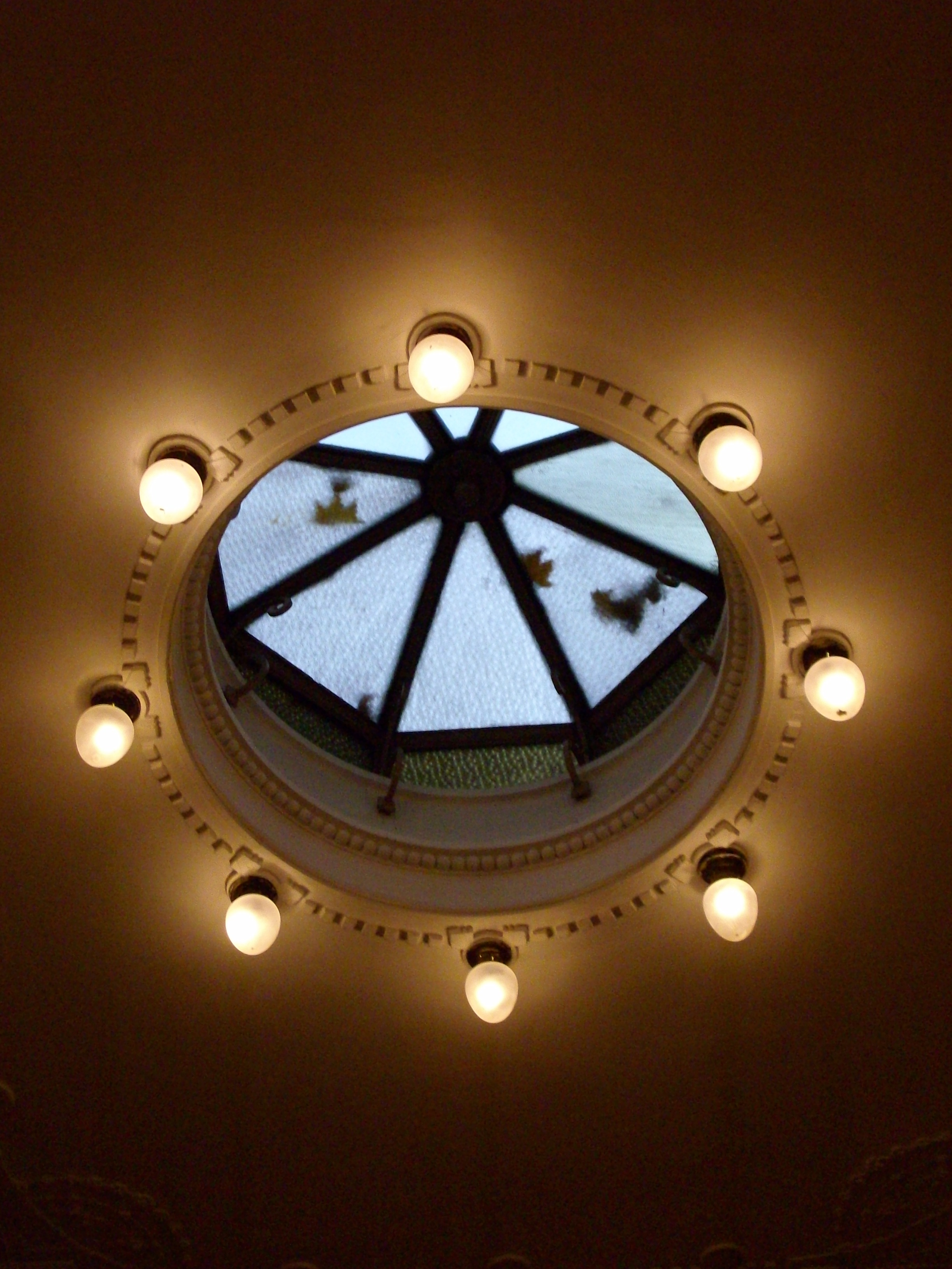 Lucernario Casa quaroni